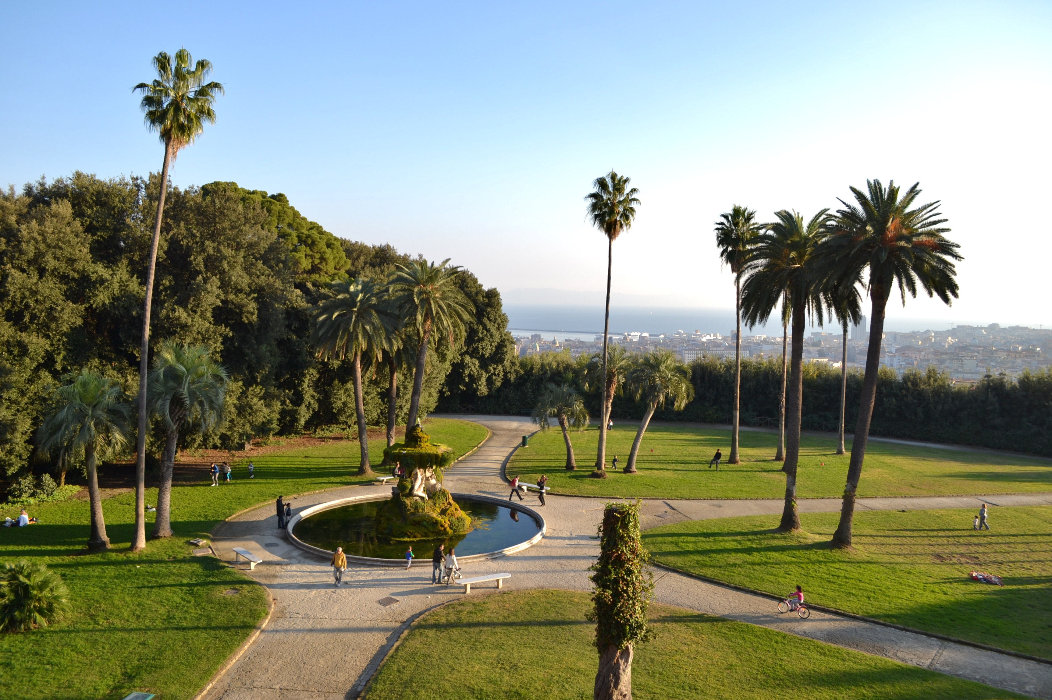 Fontana del Belvedere.